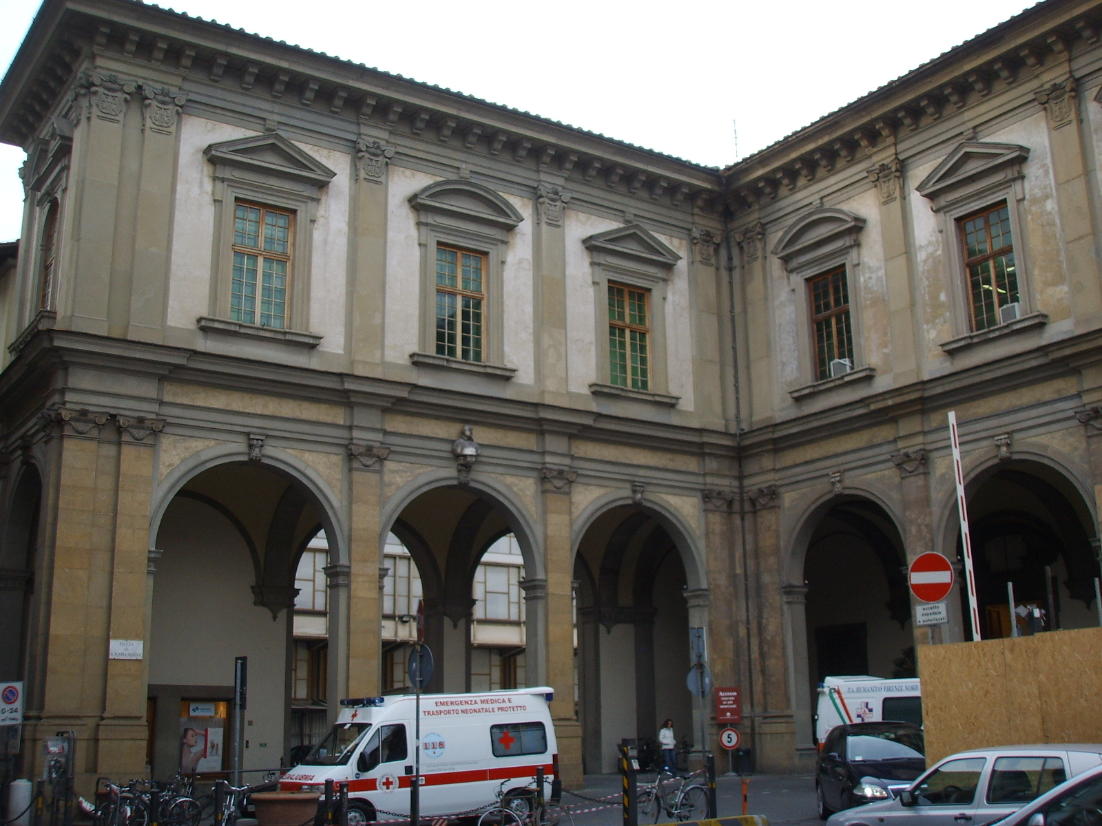 Ospedale di santa maria nuova, porticato